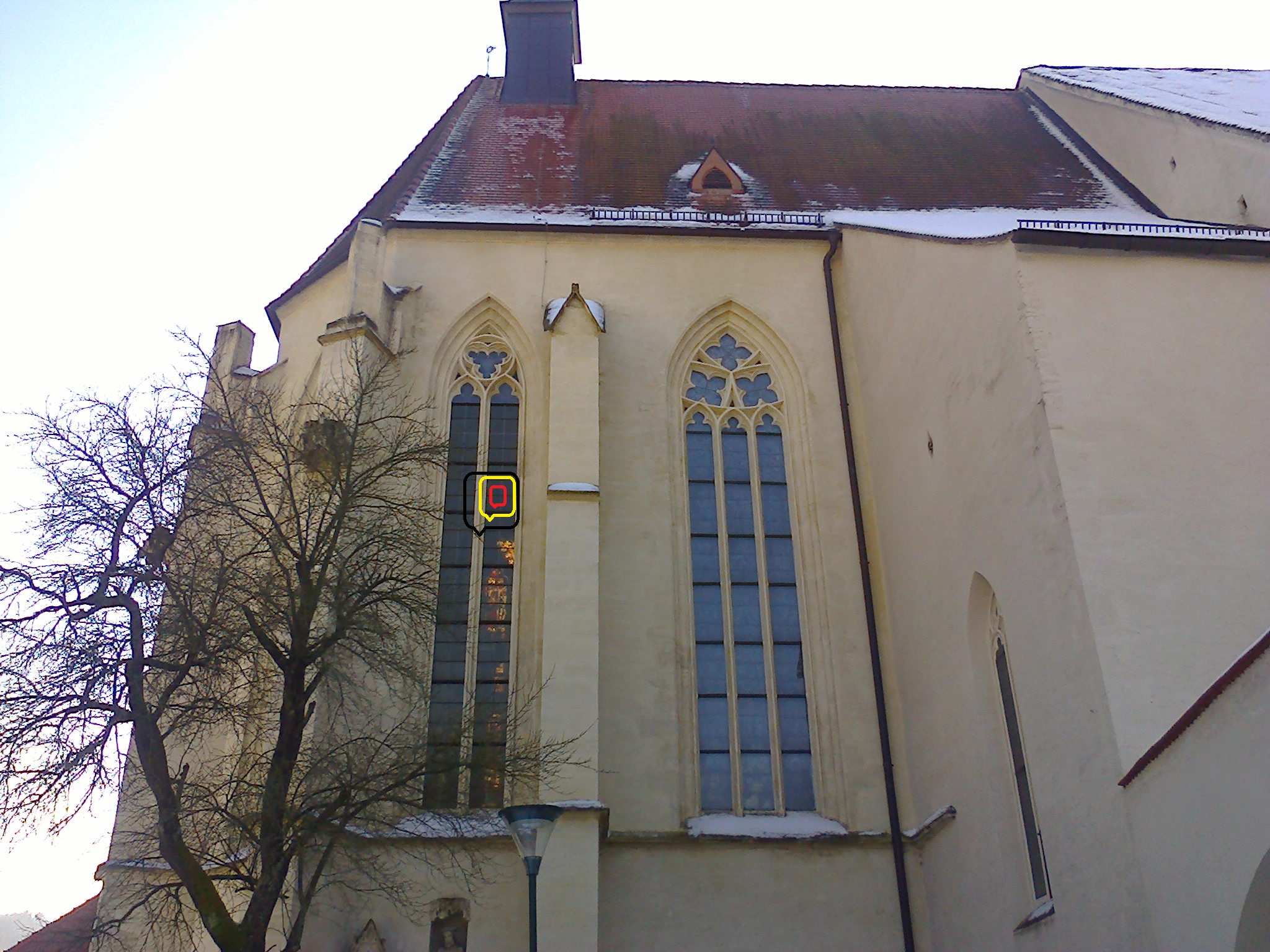 Die Nordseite der Pfarrkirche Weiten, wo jedermann die bunten, alten, bemalten Fensterscheiben durch den Sonnenlichteinfall sehen kann .